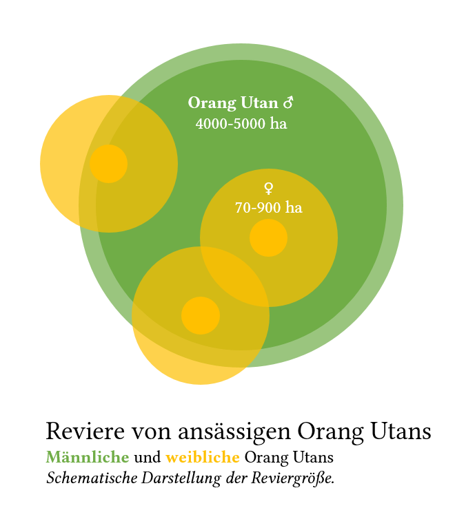 Reviergröße von ansässigen Orang-Utans (daneben gibt es pendelnde und wandernde Tiere); schematische Darstellung der Fläche